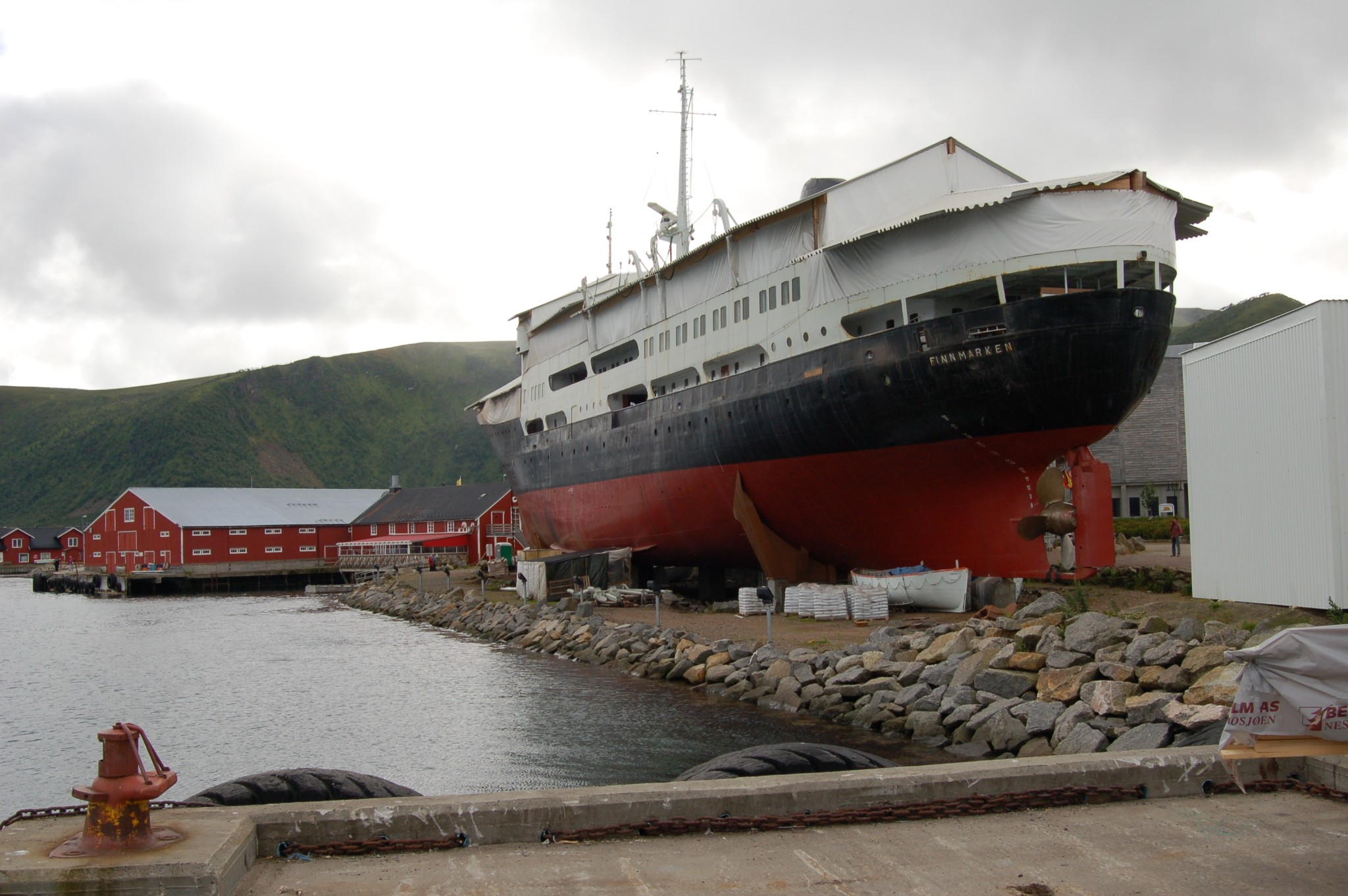 25. juli 2006 Norge, Stokmarknes, Hurtigrutens Hus